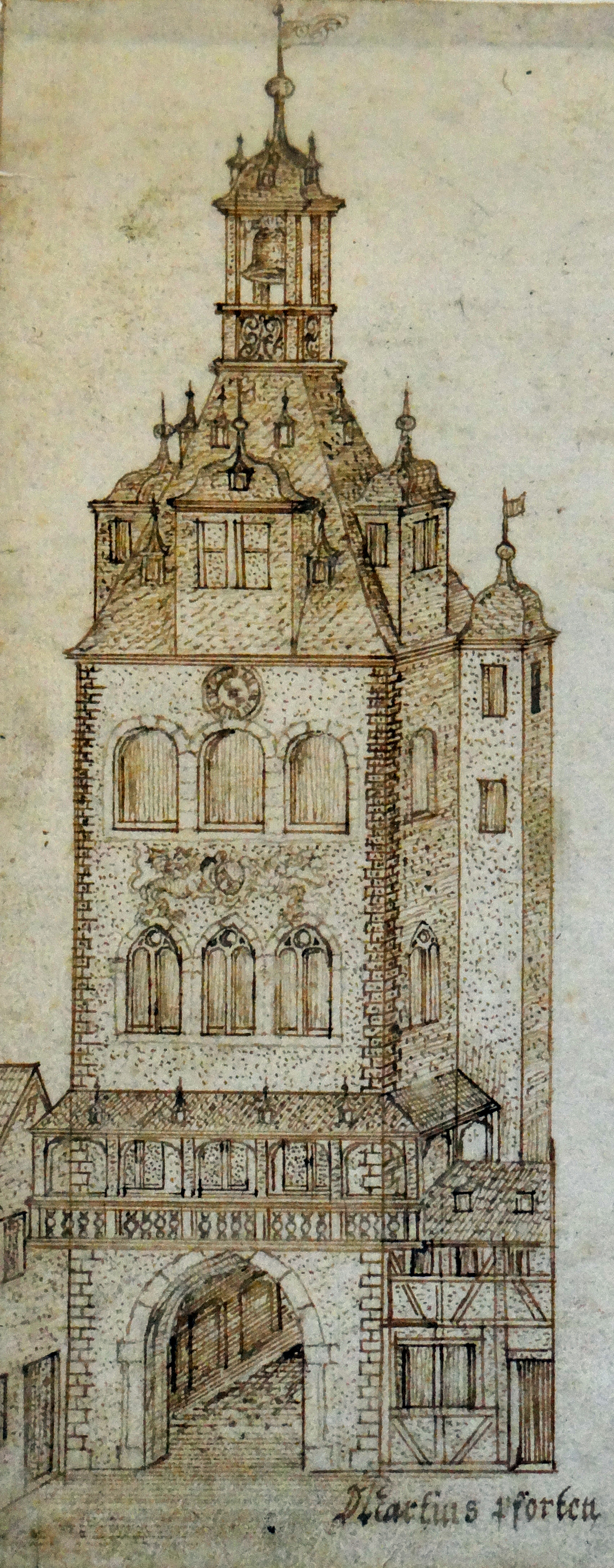 Martinspforte, Worms. Zeichnung von Peter Hamman. Stadtarchiv Worms, Abt. 1B, Nr. 48